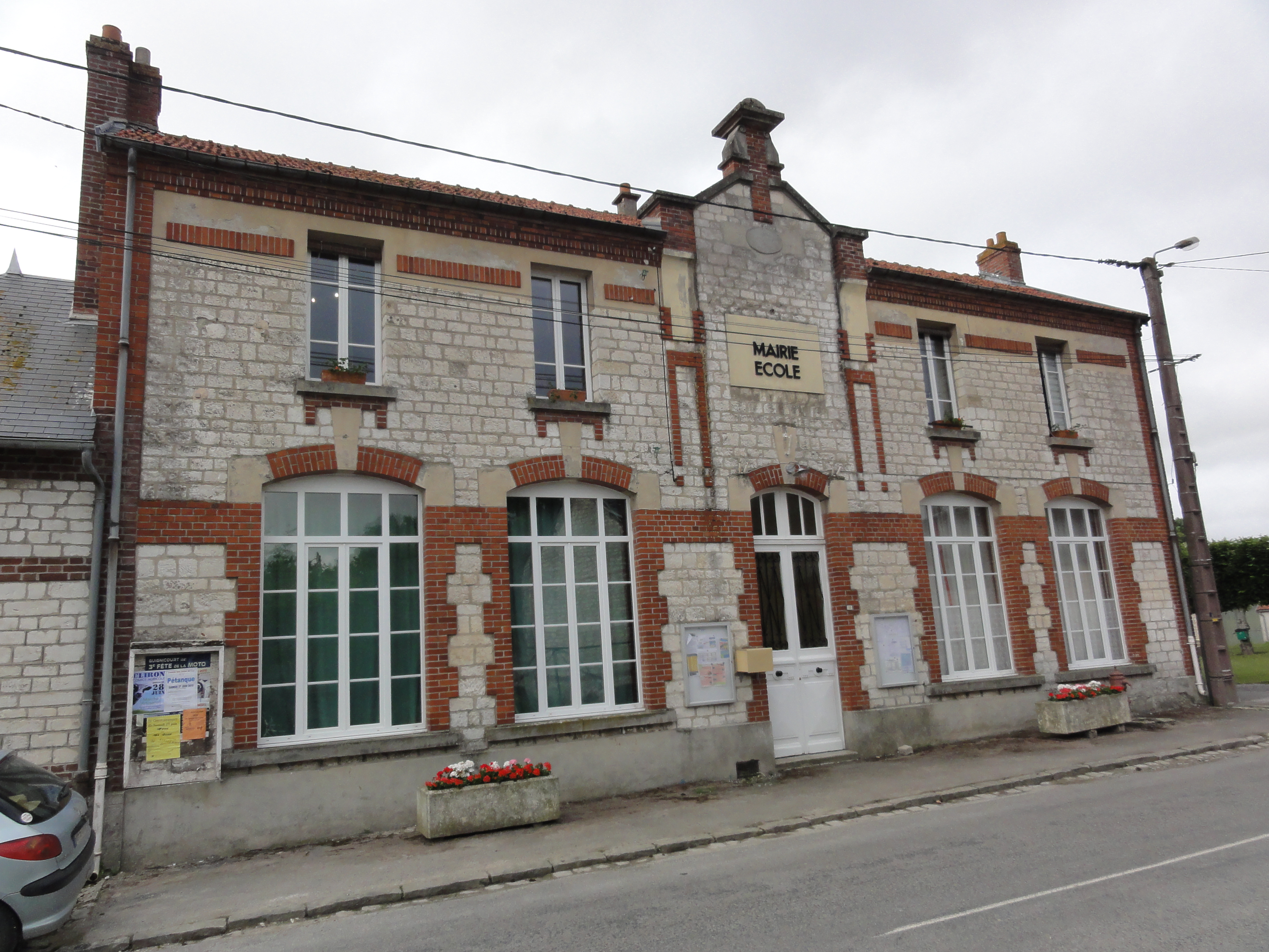 Lor (Aisne) mairie-école